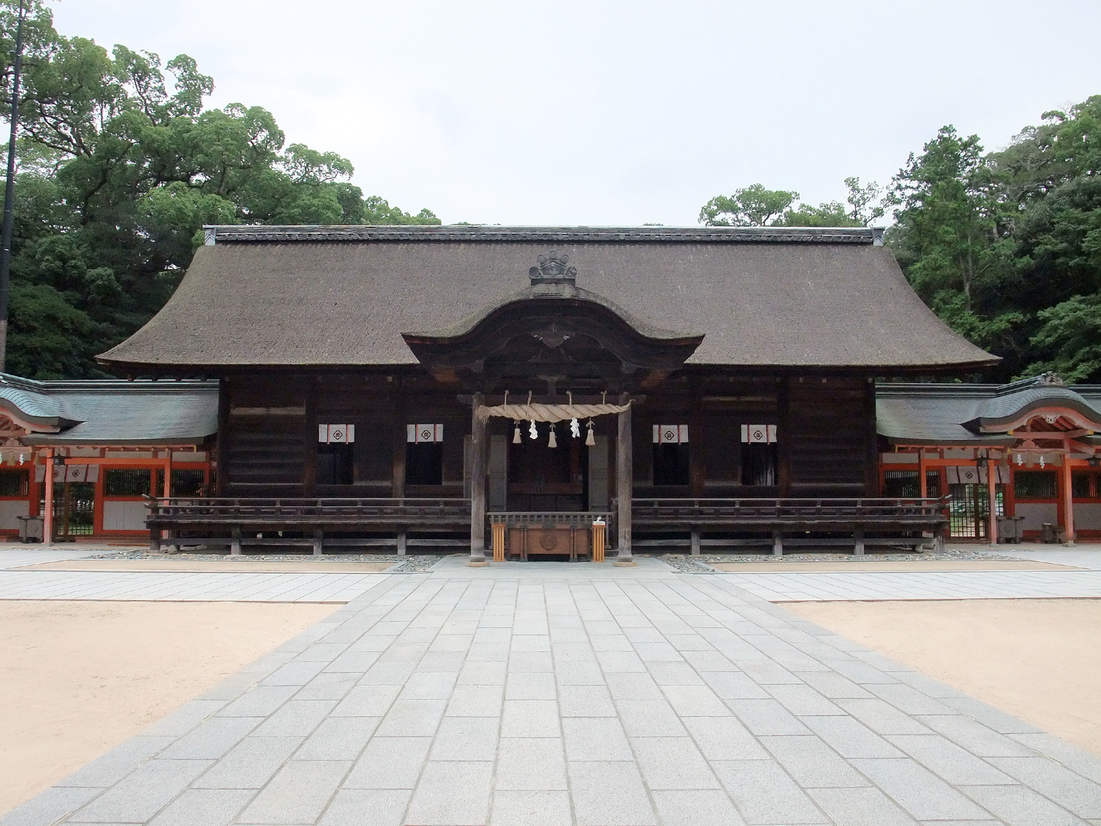 大山祇神社拝殿